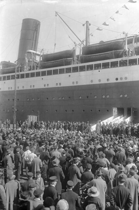 Besuch des Generalfeldmarschalls von Hindenburg im Bremerhaven, wo er den "Columbus", Deutschlands größten Überseedampfer besichtigte. Tausende von Menschen umlagerten den "Columbus" , um Hindenburg (X) Ovationen darzubringen.